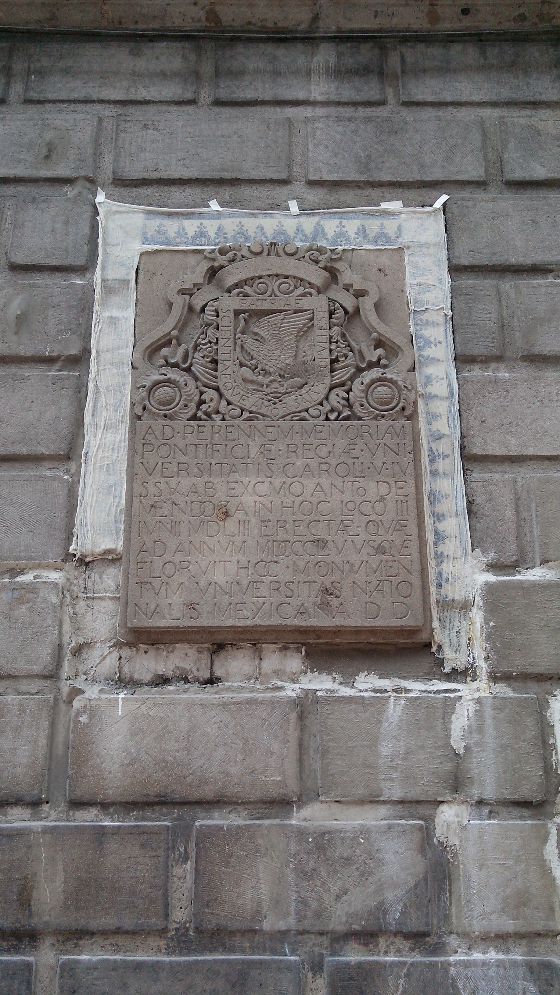 Colocada en el siglo XX, Moneda y Seminario.